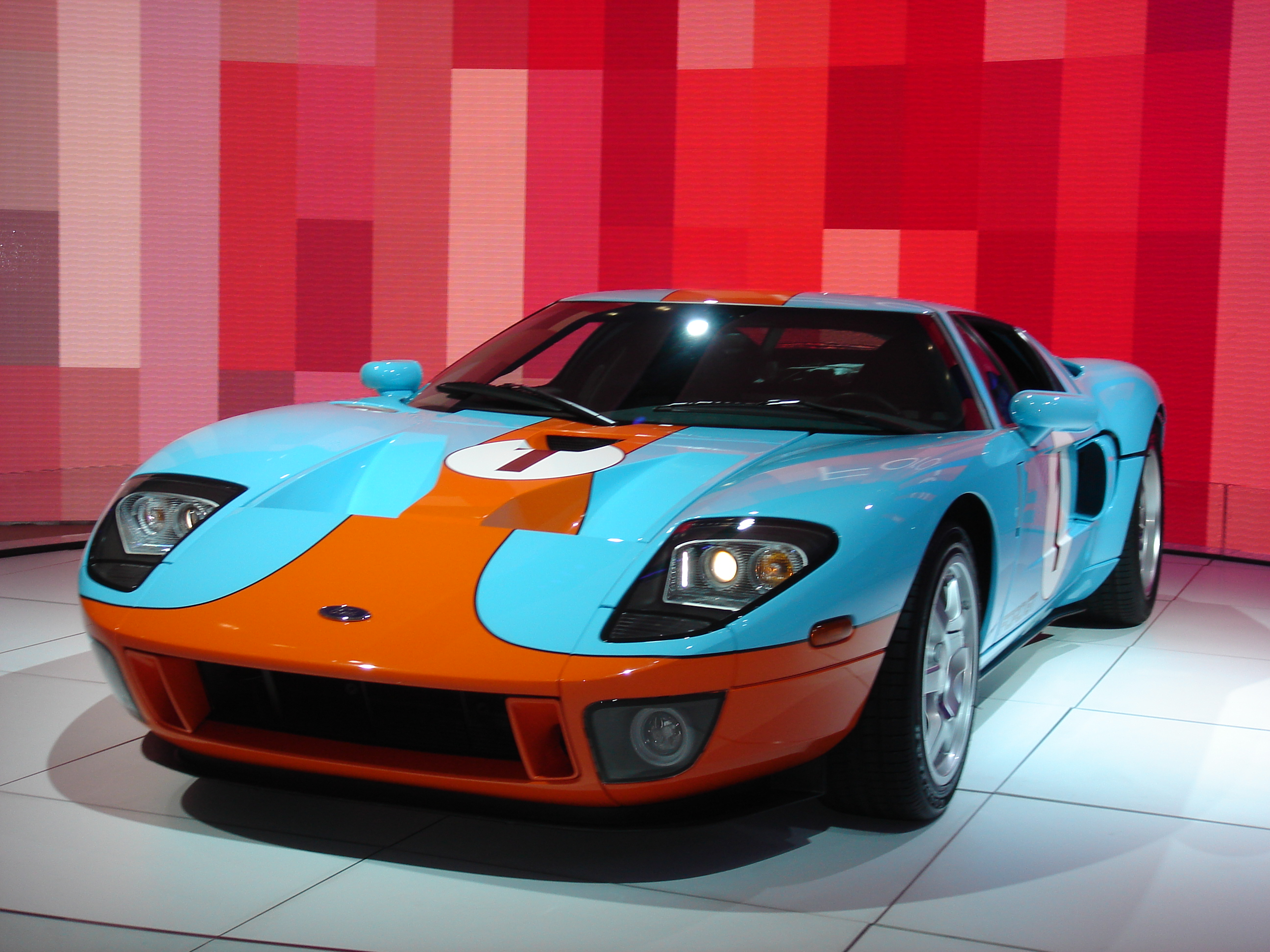 Ford GTFord GT - 1